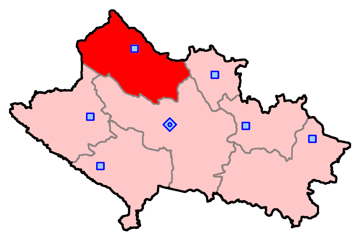 حوزه‌ نورآباد برای انتخابات مجلس شورای اسلامی